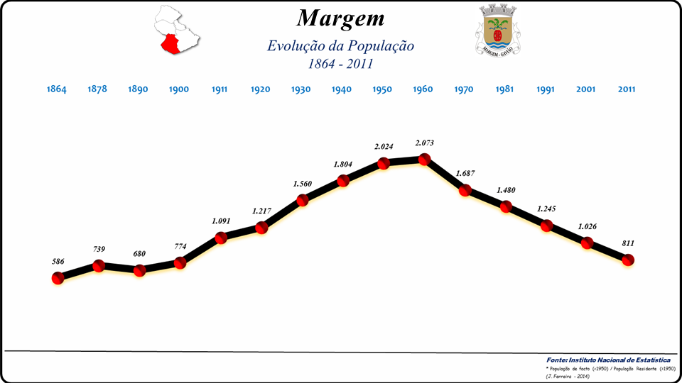 População